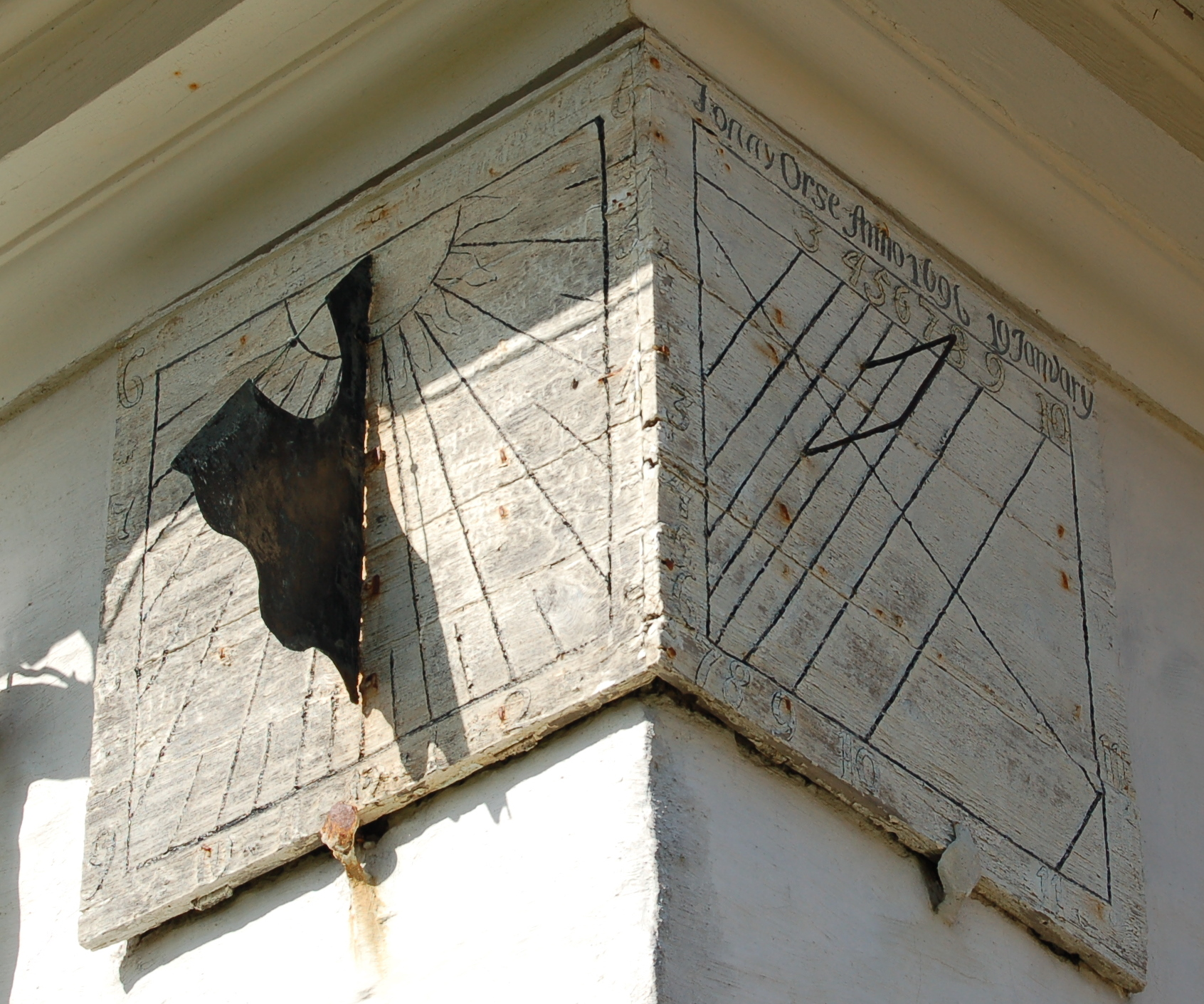 Solur Tjølling kirke - gitt av Johan Orse 1696